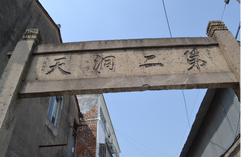 中文（中国大陆）: 第二洞天的石牌坊